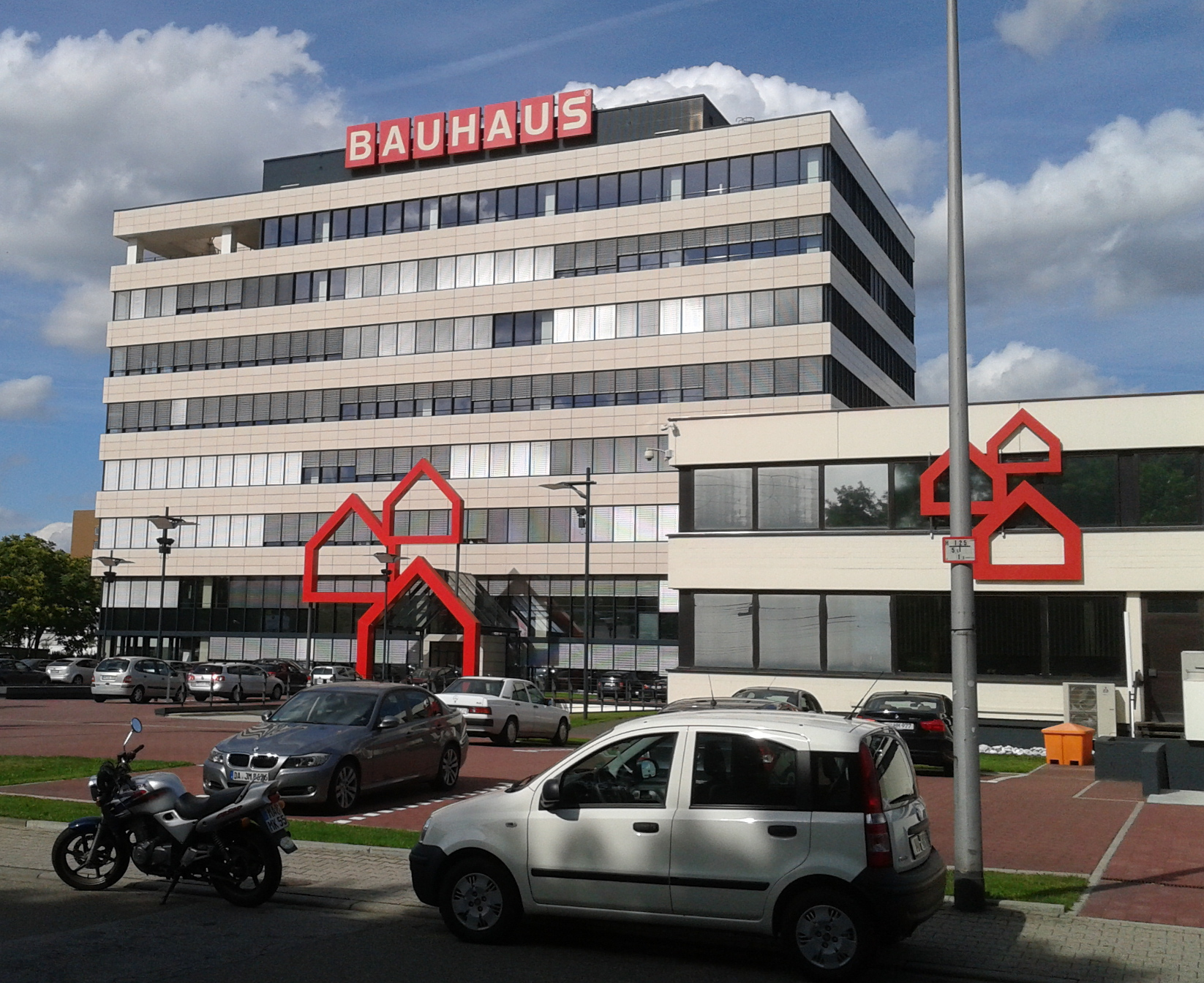 Bauhaus-Zentrale in Mannheim, Gutenbergstr.